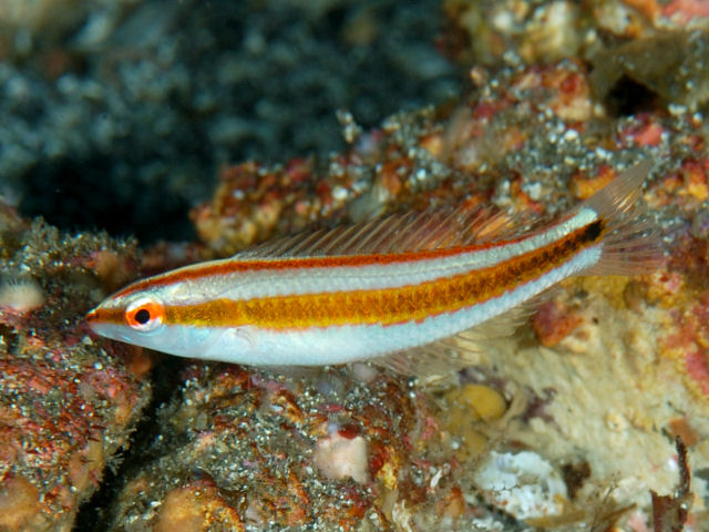 キスジキュウセン Halichoeres hartzfeldii